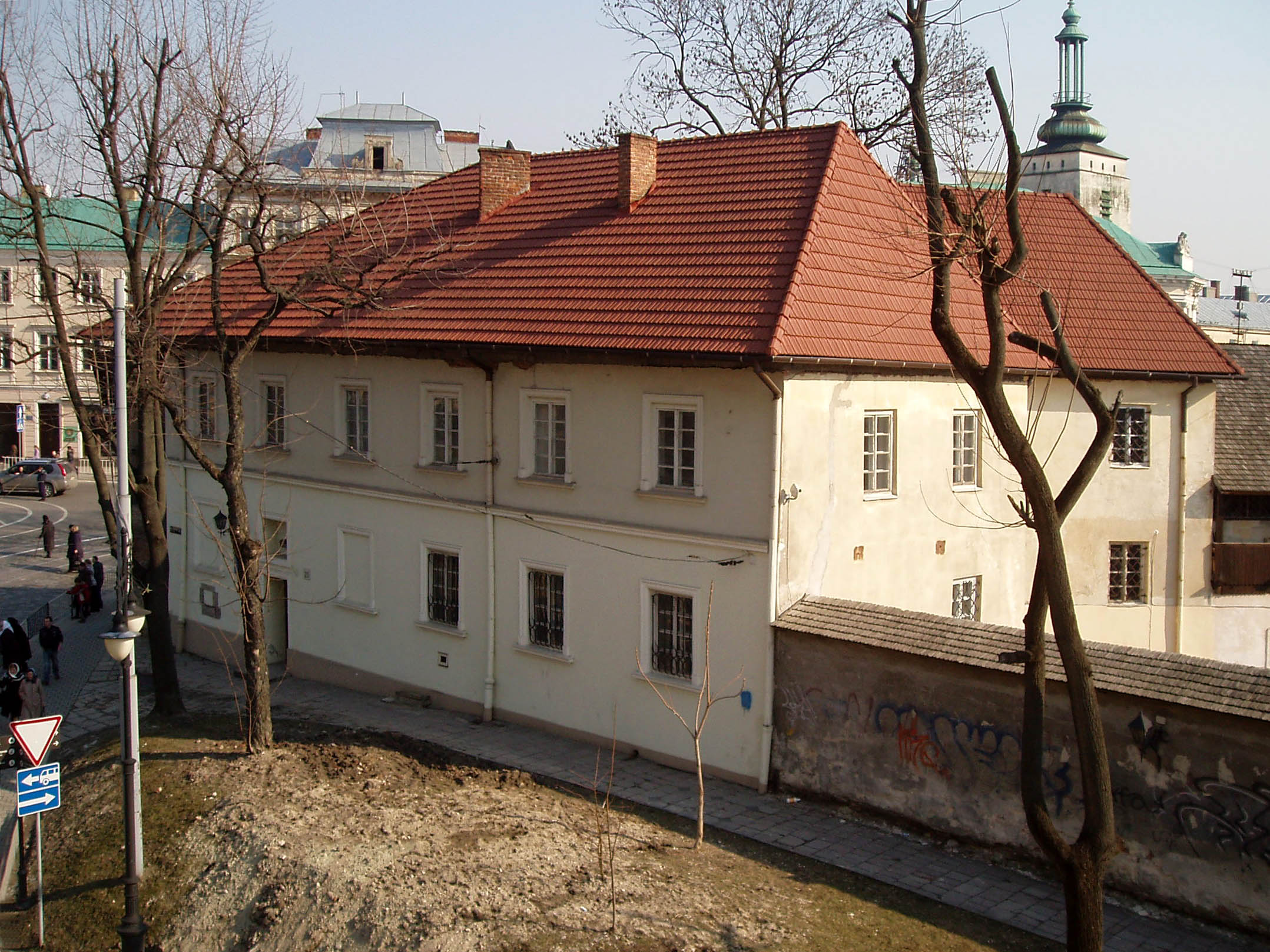 Будинок № 22 на вулиці Валовій у Львові.